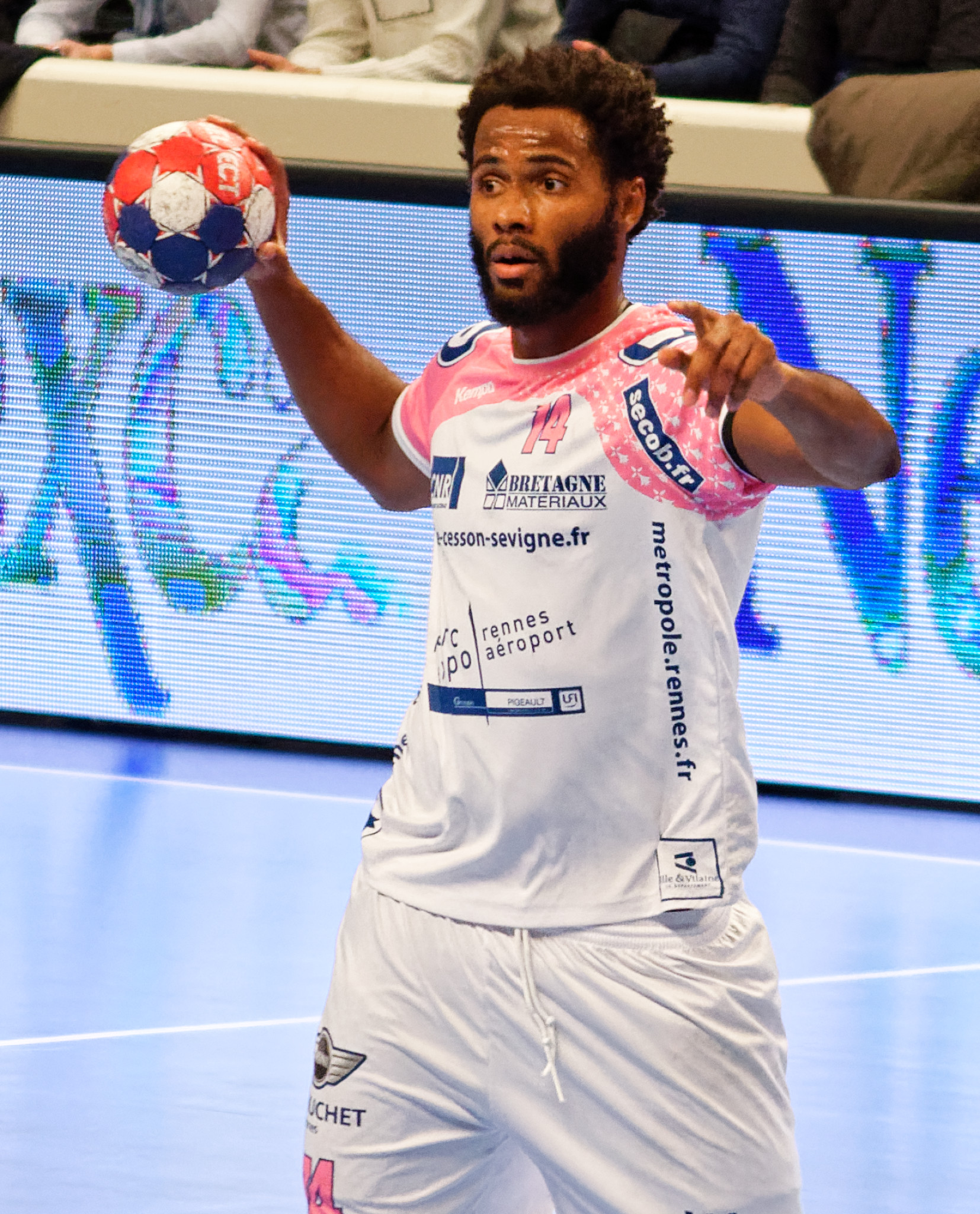 Rencontre du championnat de LNH entre le PSG et Cesson Rennes Métropole. A Coubertin, le 02 décembre 2015.